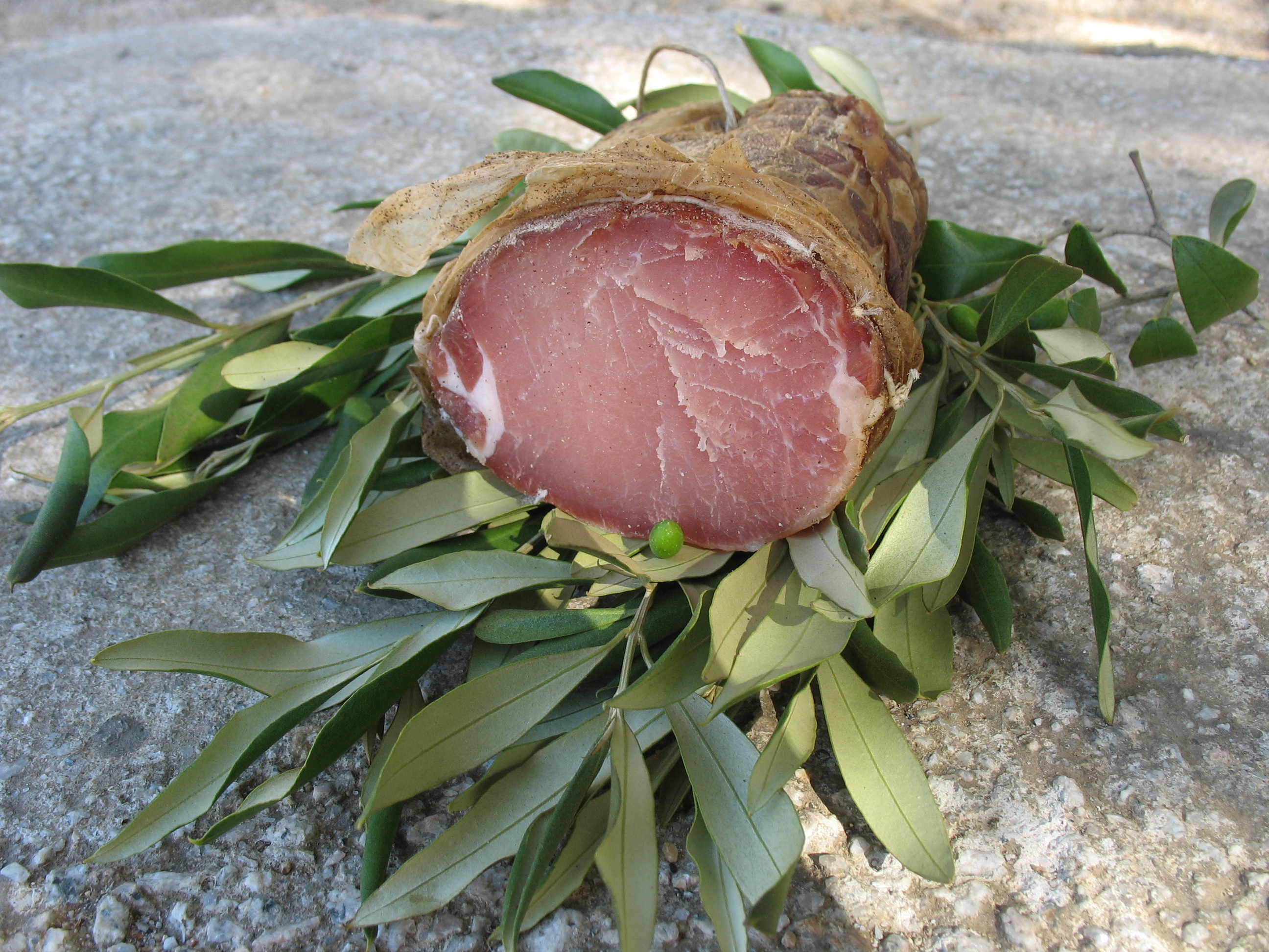 Lonzu, eine korsische Spezialität aus Schweinefilet. Das Bild zeigt einen halben Lonzu.